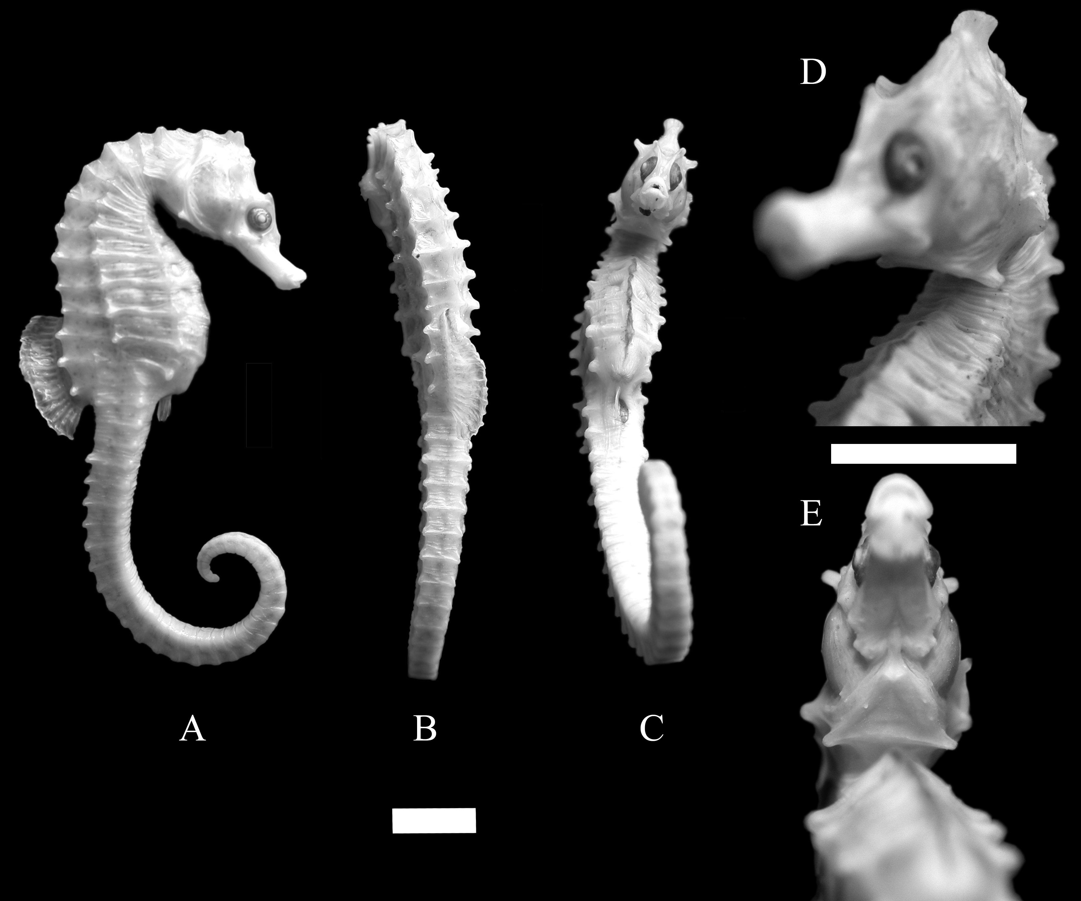 Vistas lateral, dorsal, ventral y detalles de la cabeza del holotipo de Hippocampus patagonicus